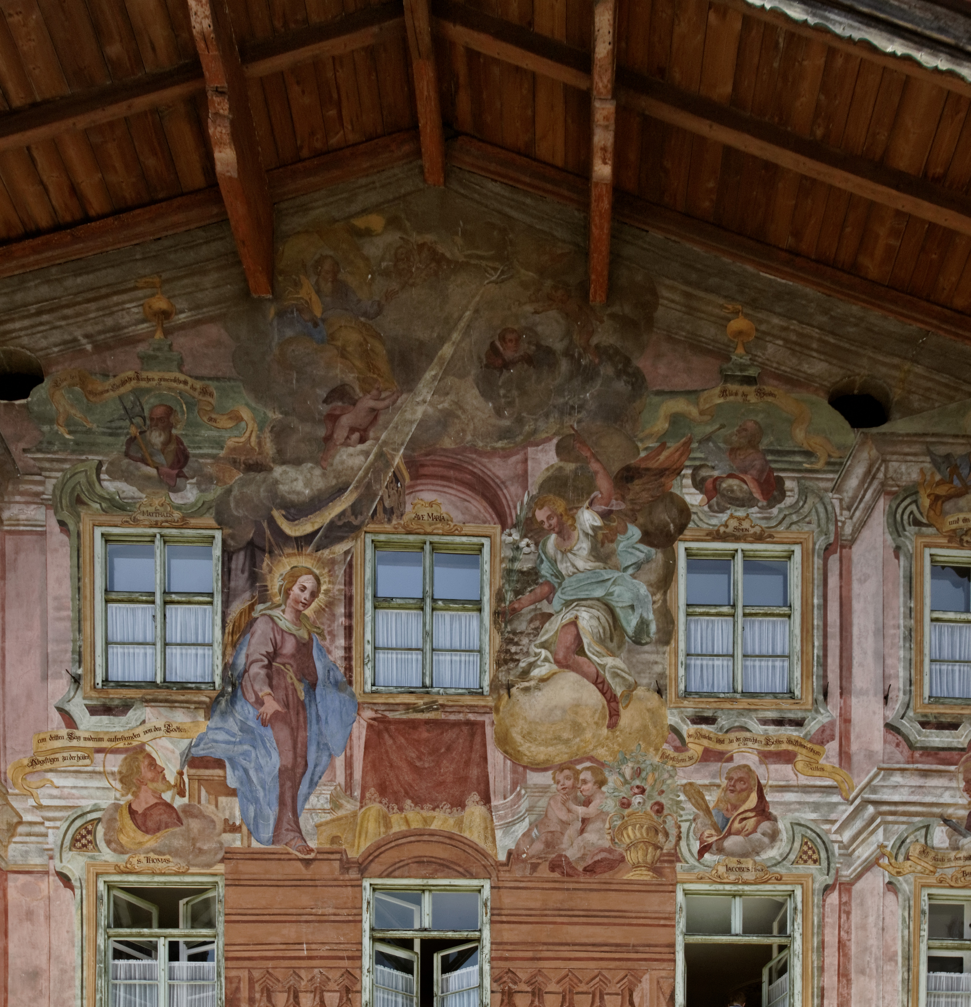 Mittenwald, Obermarkt 24, Giebelteilansicht; Denkmalliste Mittenwald D-1-80-123-111